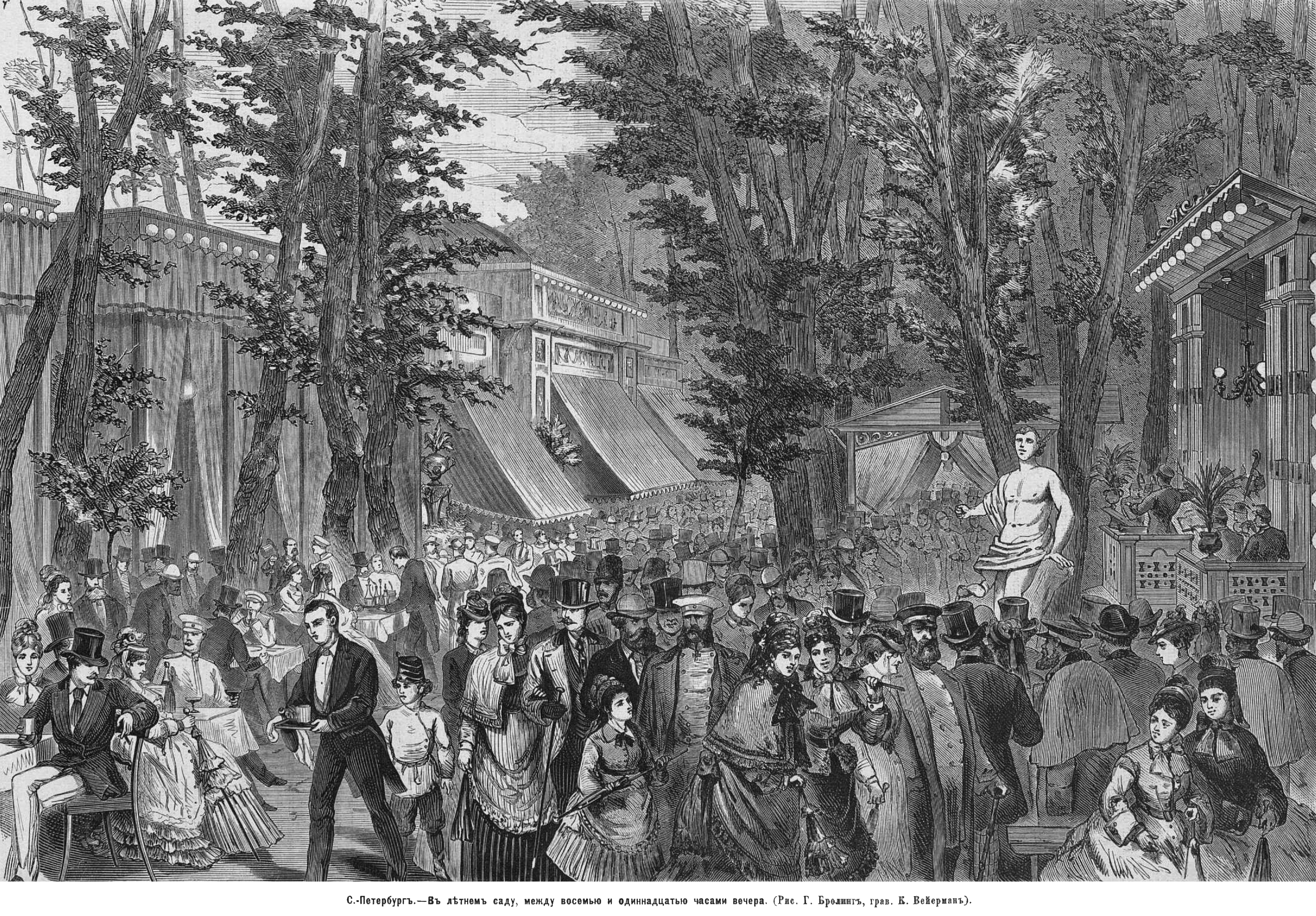 Вечер в Летнем саду, 1873 год